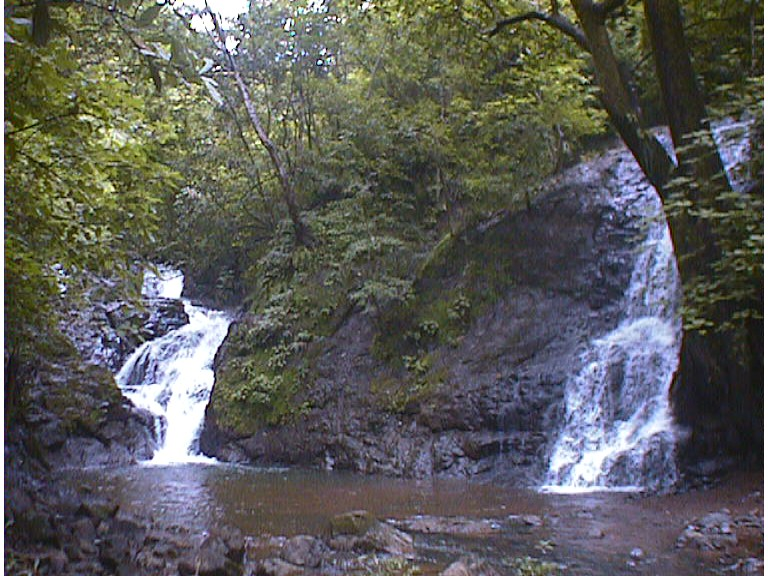 Mala Noche Waterfalls, Nosara, Nicoya, Guanacaste, Costa Rica